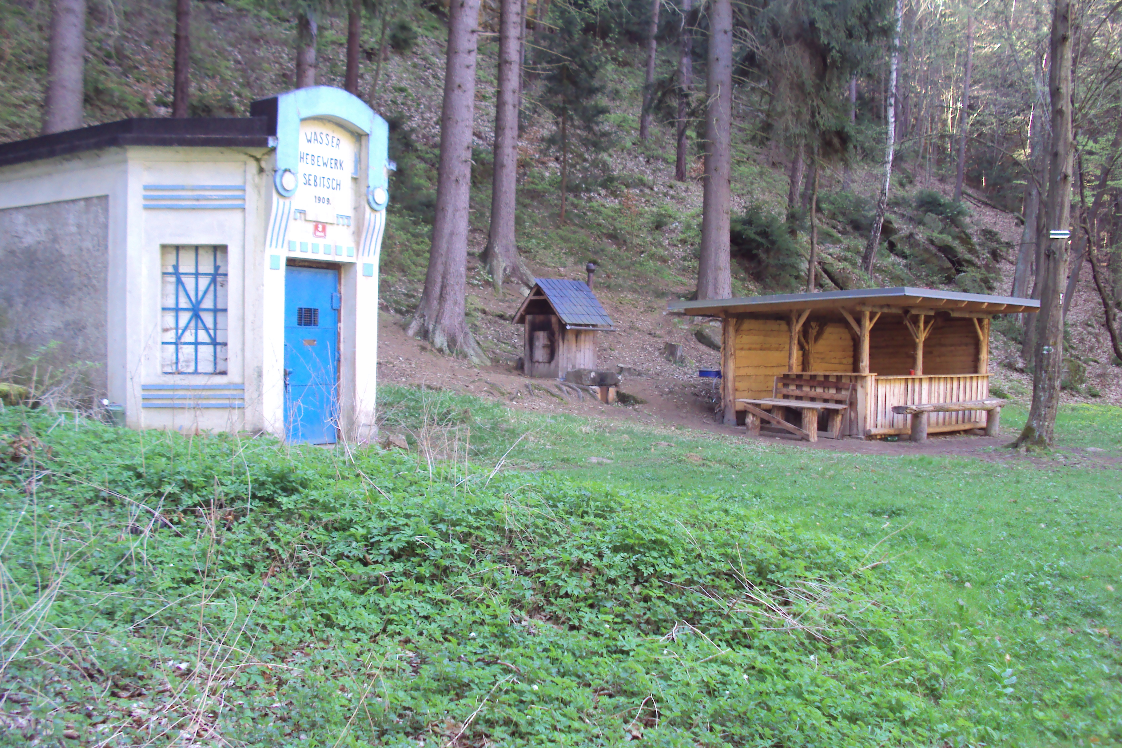 Uprostřed Dolského údolí je vodárenský objekt a tato scenérie při zelené trase od Holan do Dřevčic